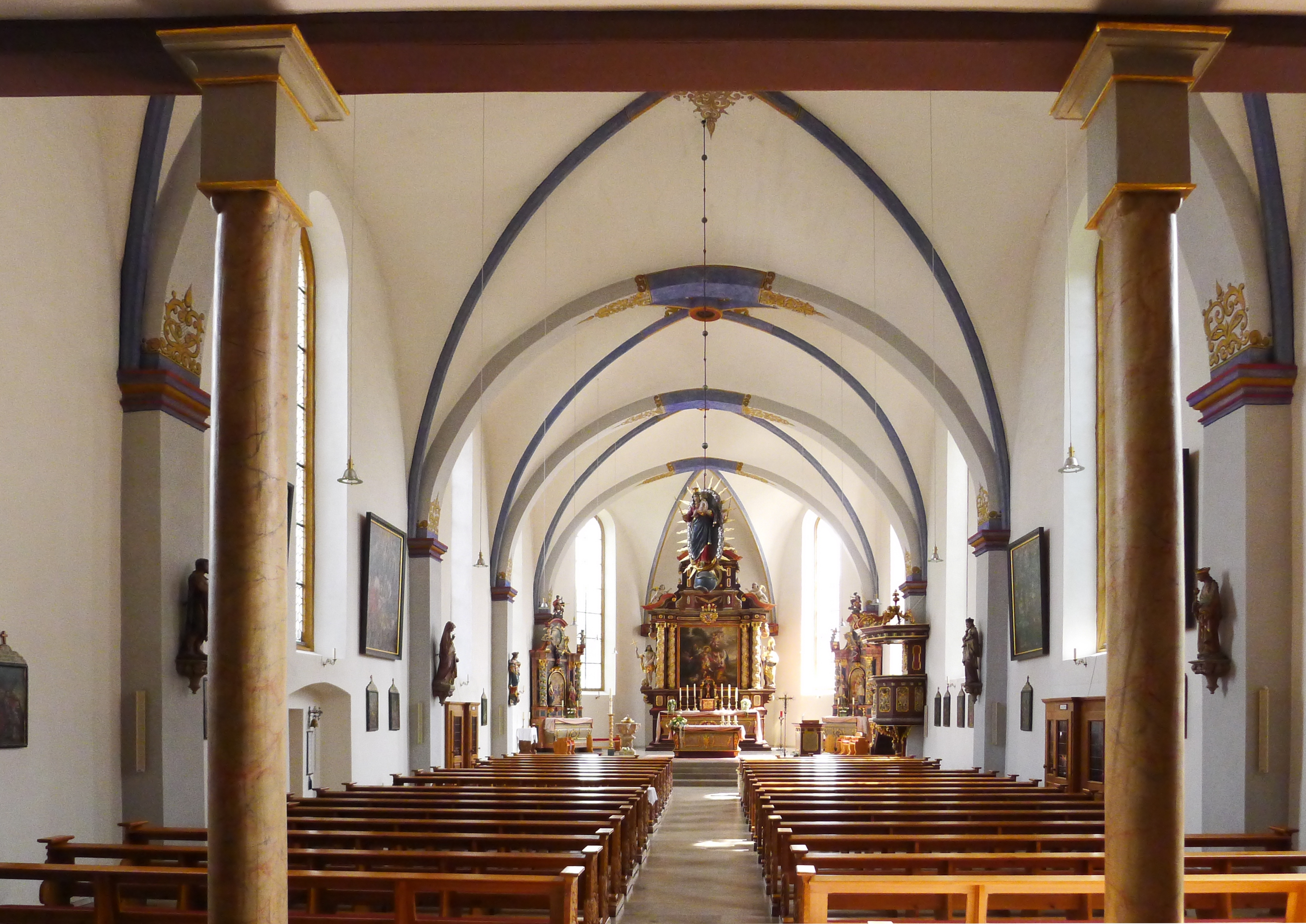 Innenraum von St. Johannes Baptist